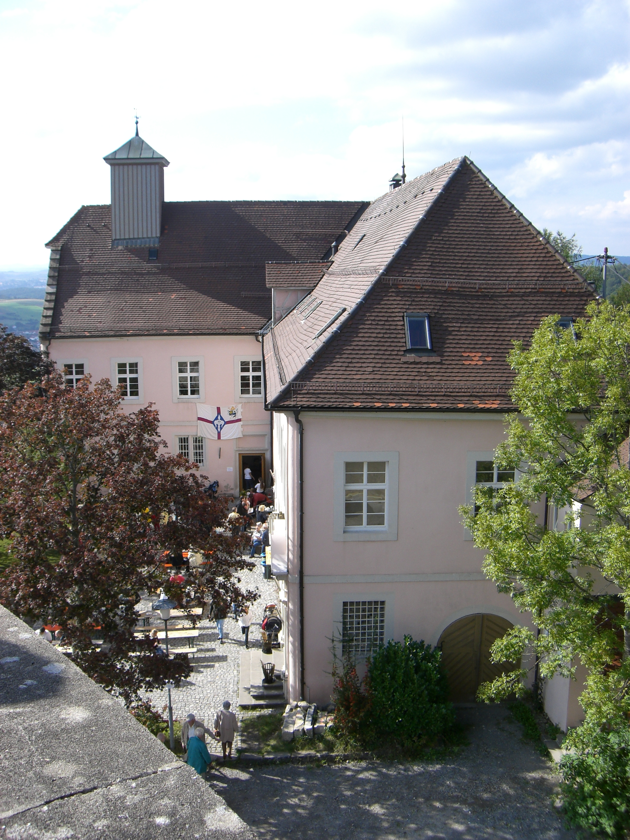 Schloss Ebersberg, Tag der offenen Tür